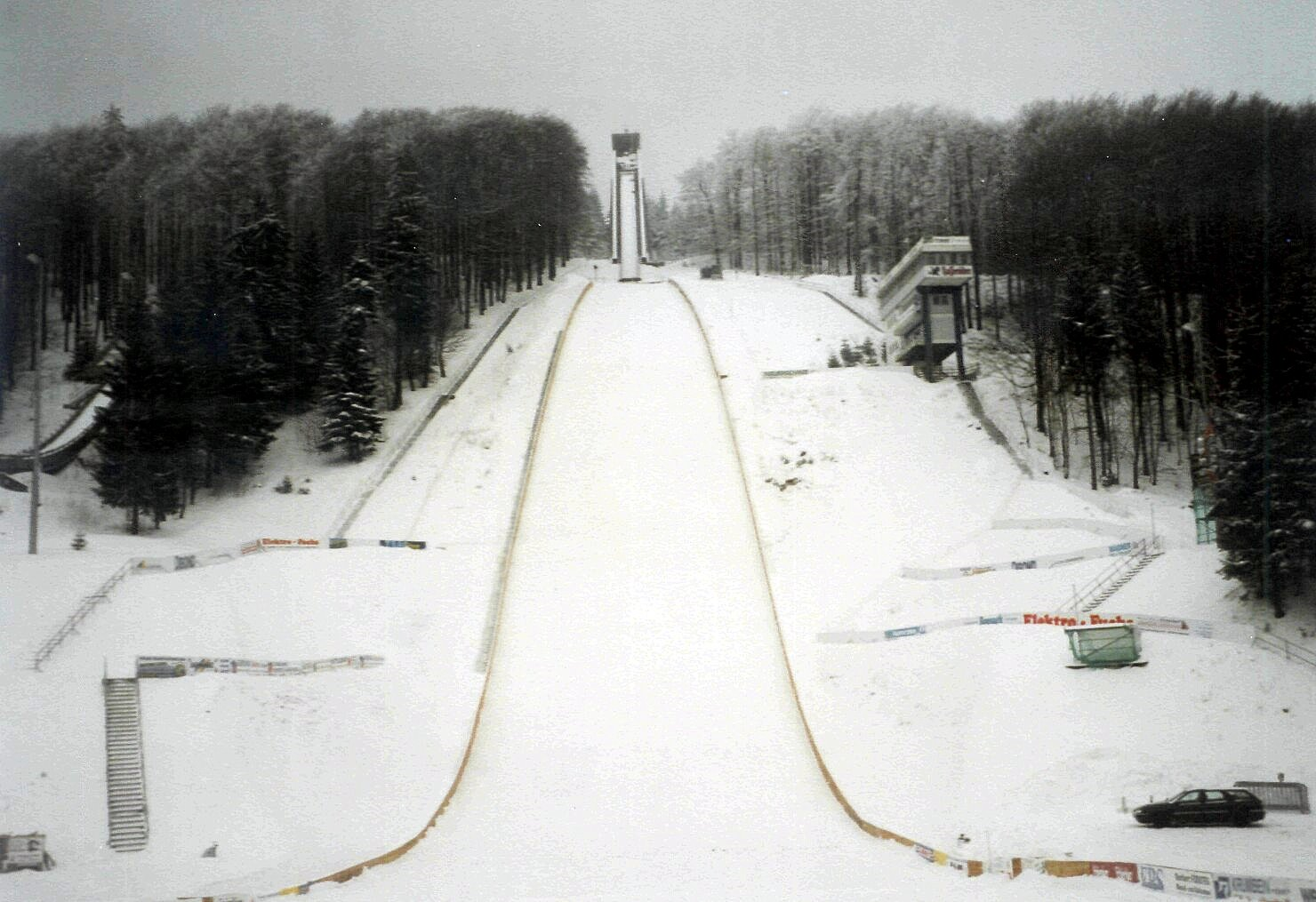 Inselbergschanze bei Brotterode